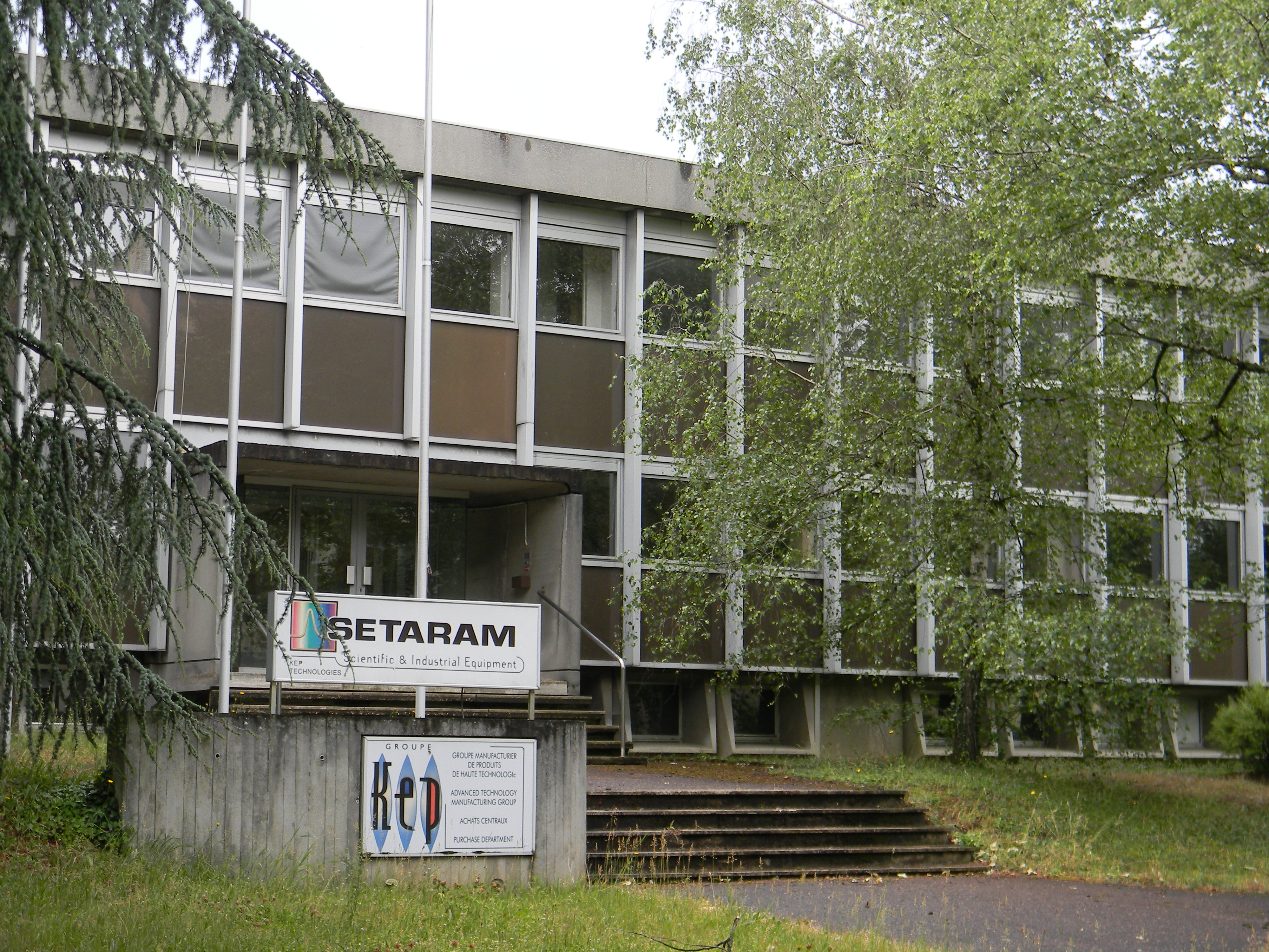 Entreprise SETARAM dans le quartier Bissardon de Caluire-et-Cuire